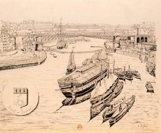 Brest Le Pont tournant et l'Arsenal par O. Du Bré (dessin, collectionneur : Destailleur, Hippolyte (1822-1893)